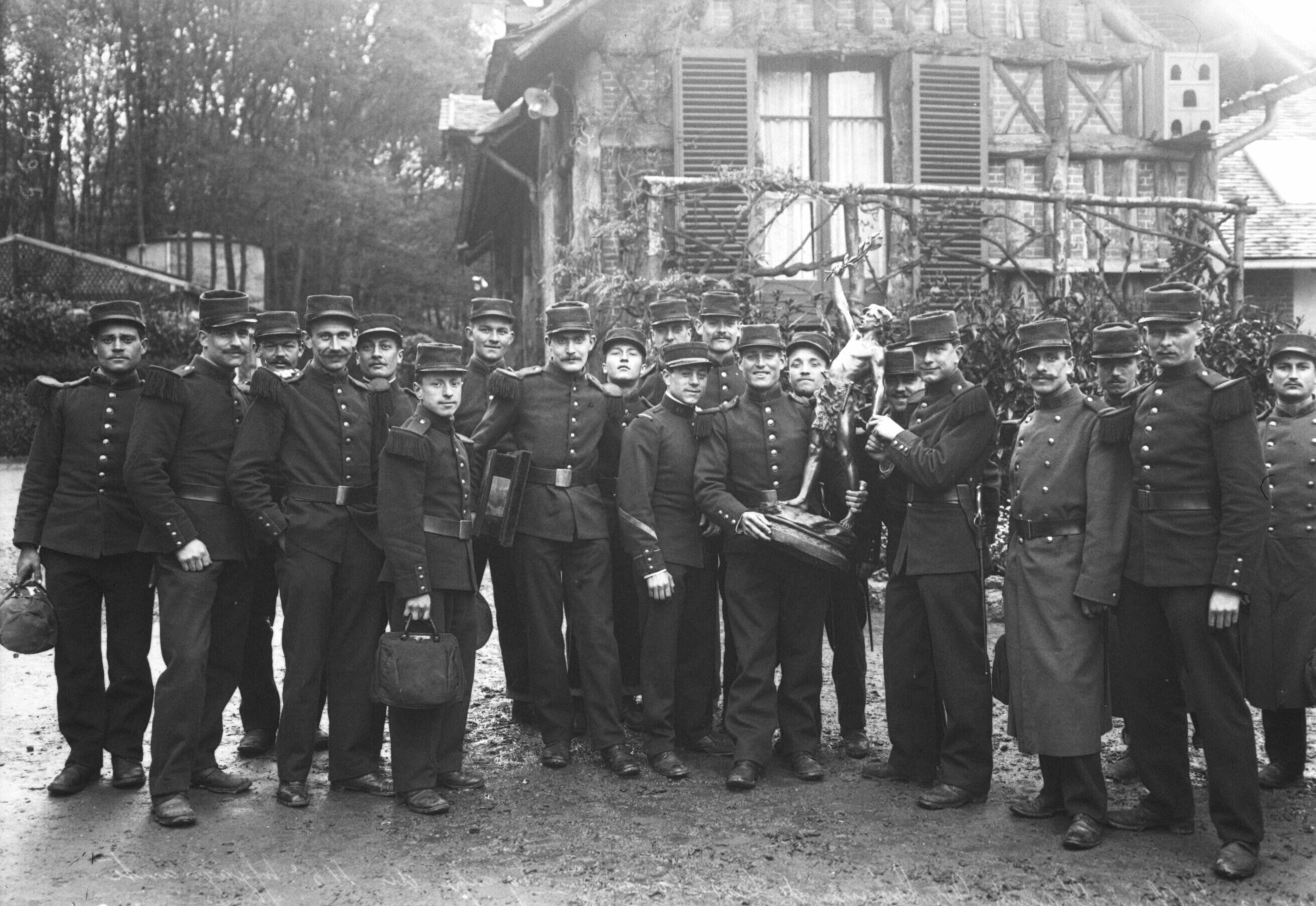 4-5-13, Saint-Cloud, championnat militaire de cross country, équipe du 46e [régiment d']infanterie gagnante : [photographie de presse] / [Agence Rol] photogr. nég. sur verre ; 13 x 18 cm (sup.)